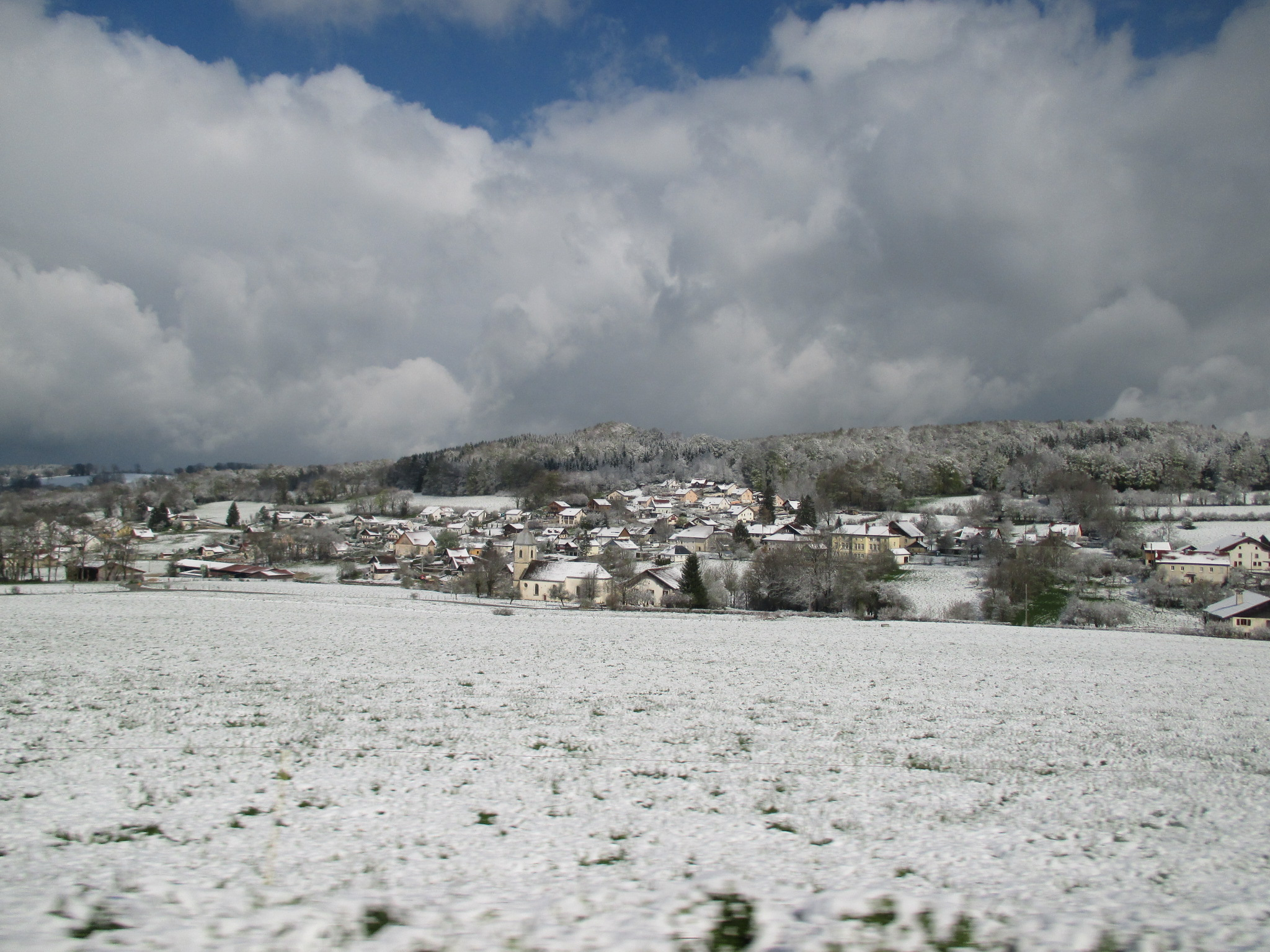 Les Bréseux